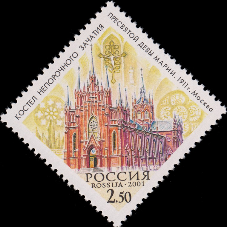 Костел Непорочного Зачатия.